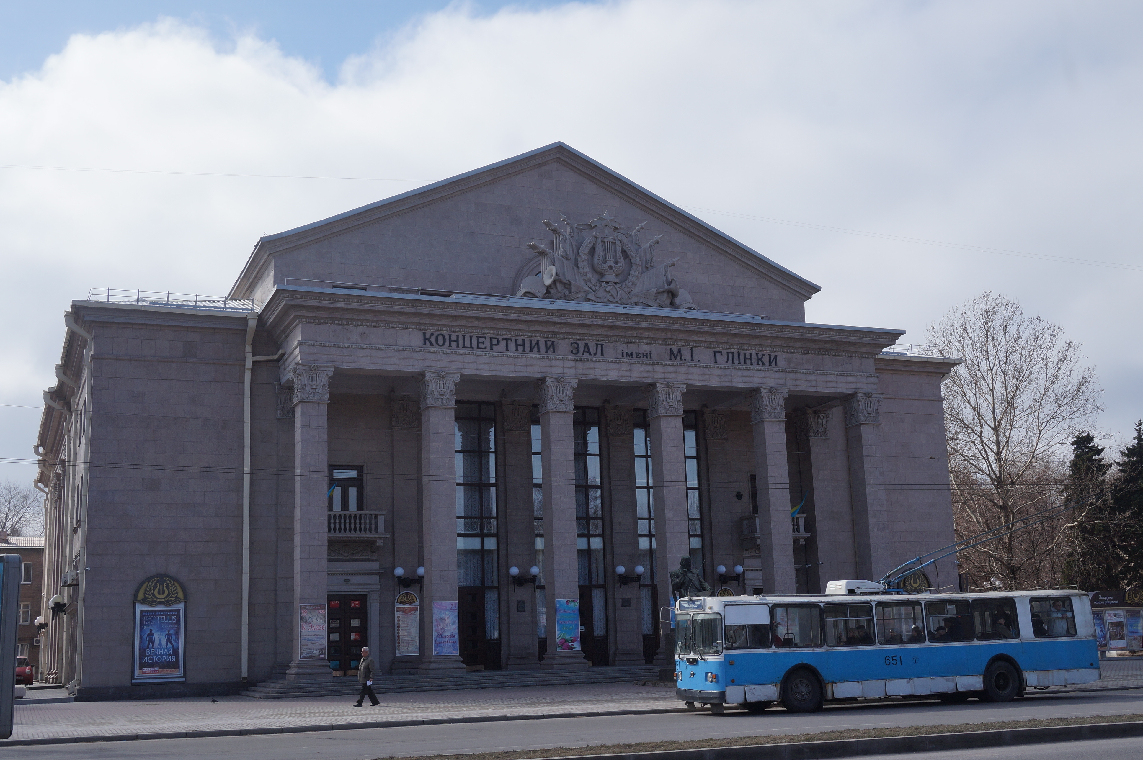 Кіноконцертний зал ім. М.І. Глінки, Запоріжжя, пр-т Соборний (Леніна), 183